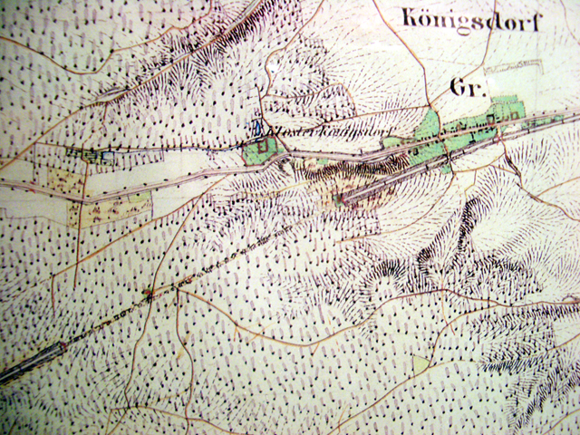 Ausschnitt(foto) aus Topografischer Karte von 1845 mit dem Königsdorfer Tunnel